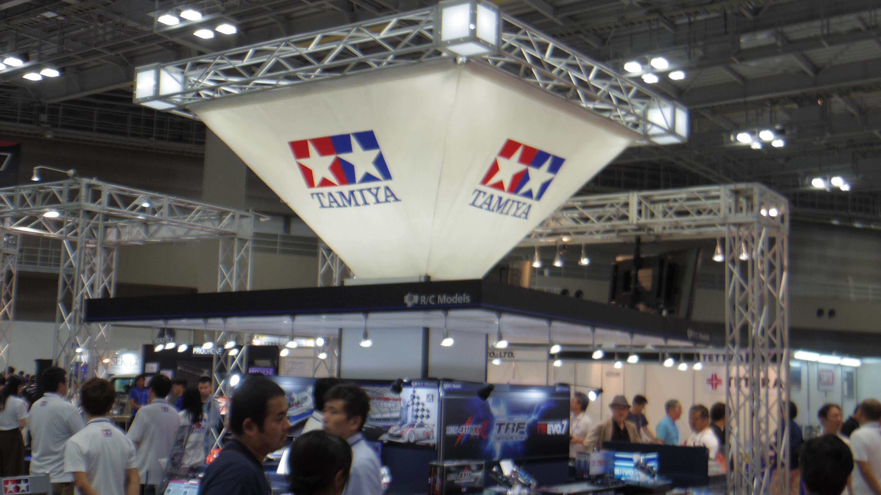 「第57回全日本模型ホビーショー」（2017年9月30日・10月1日、東京ビッグサイト）の「タミヤ」ブース。